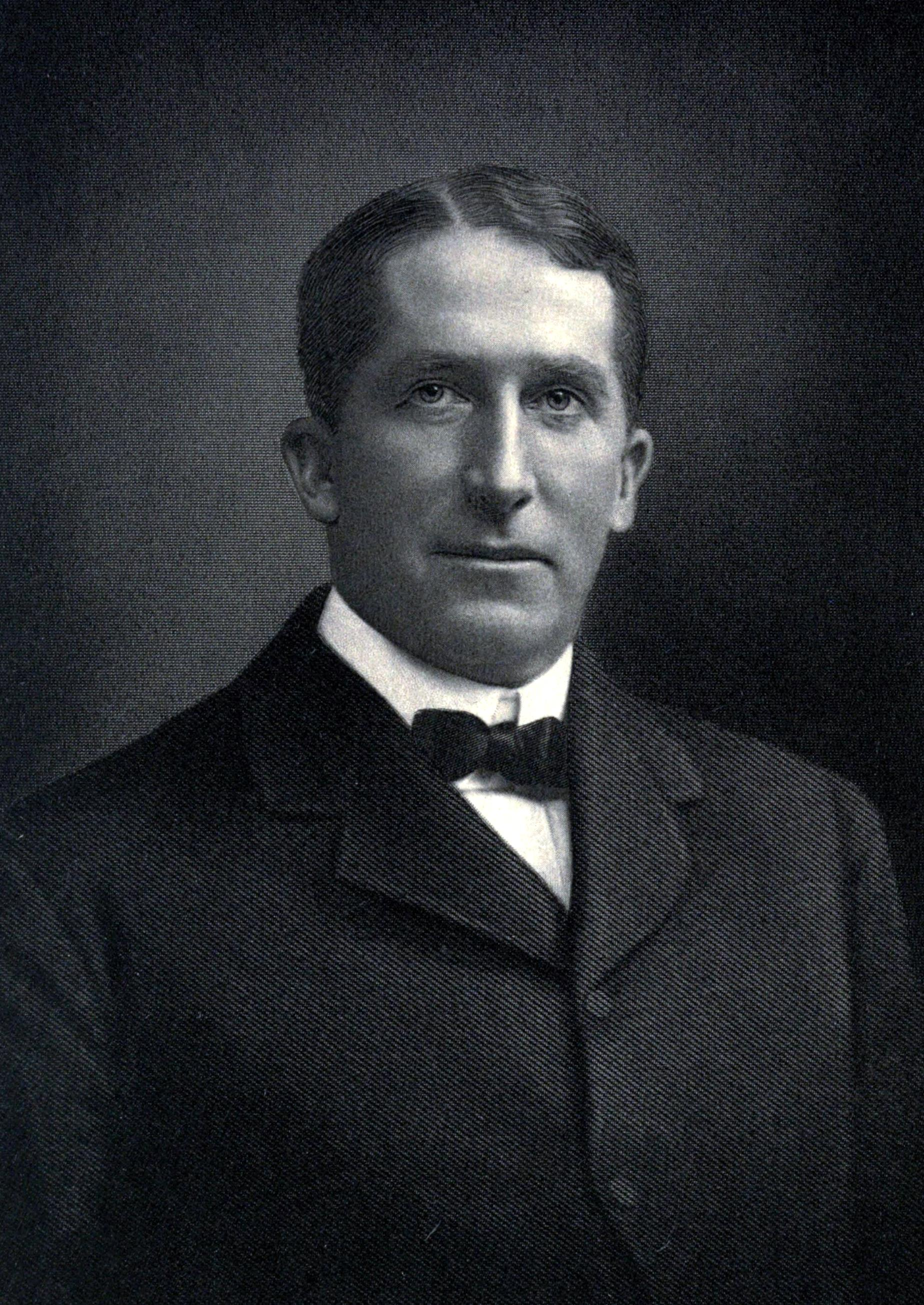 Harmanus (Herman) Barkulo Duryea